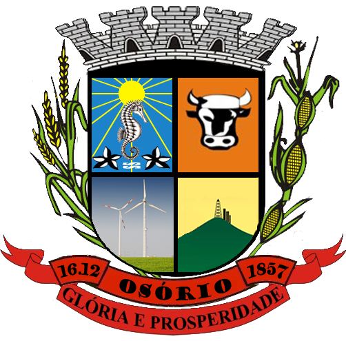 Outra opção de Brasão no formato correto.